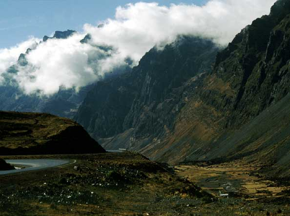 Bolivien: Yungas (etwa 4000 m über NN)